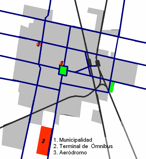 Aérea urbana de la ciudad de Rafaela